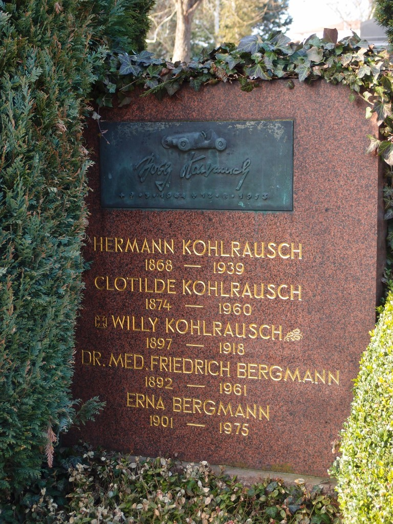 Grab des Rennfahrers Robert „Bobby“ Kohlrausch (1904-1953) auf dem Neuen Friedhof in Eisenach